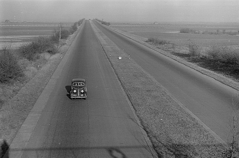 Original image description from the Deutsche Fotothek Blick von oben auf einen fahrenden BMW 501 auf der Autobahn